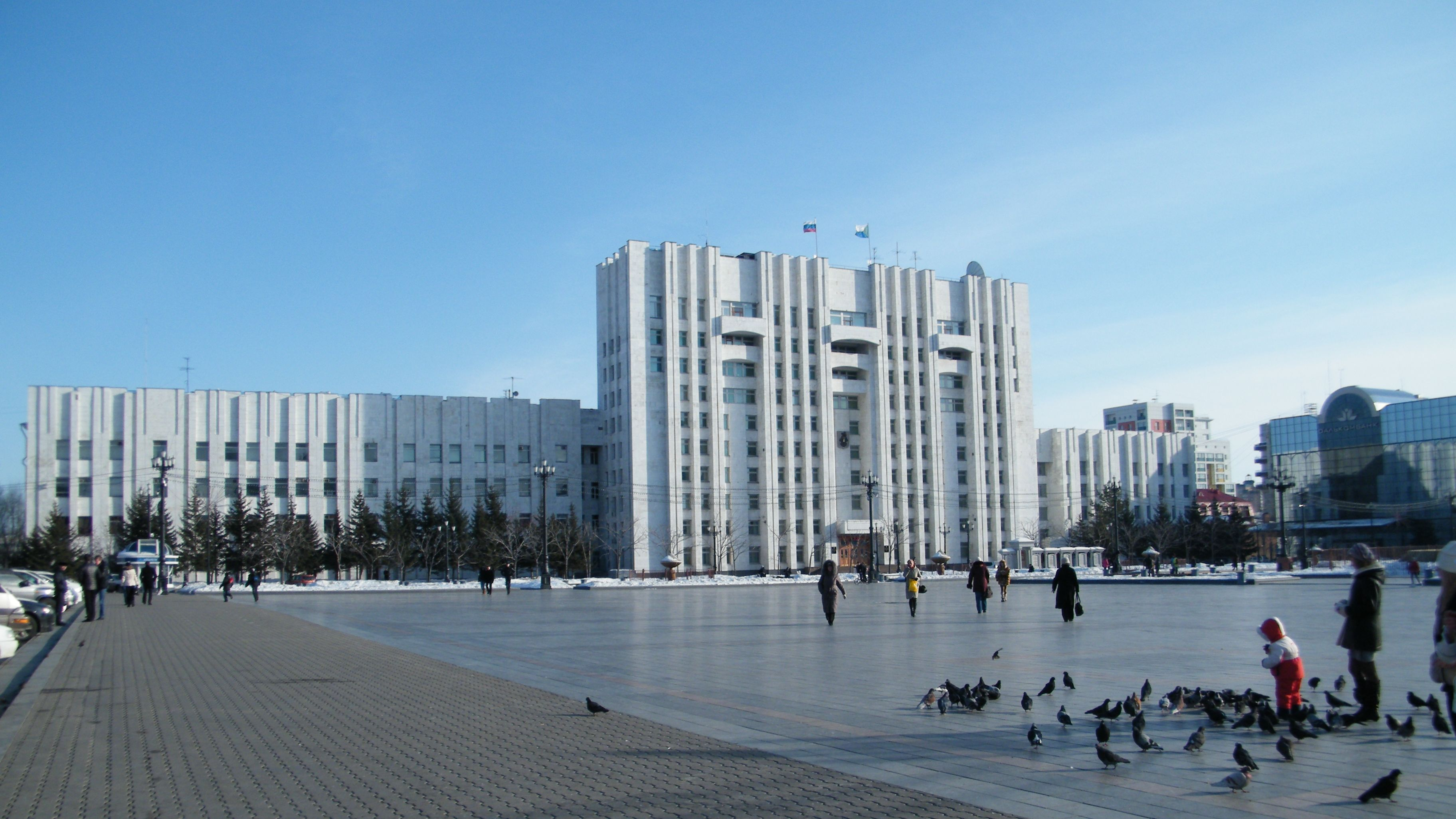 Здание Правительства Хабаровского края